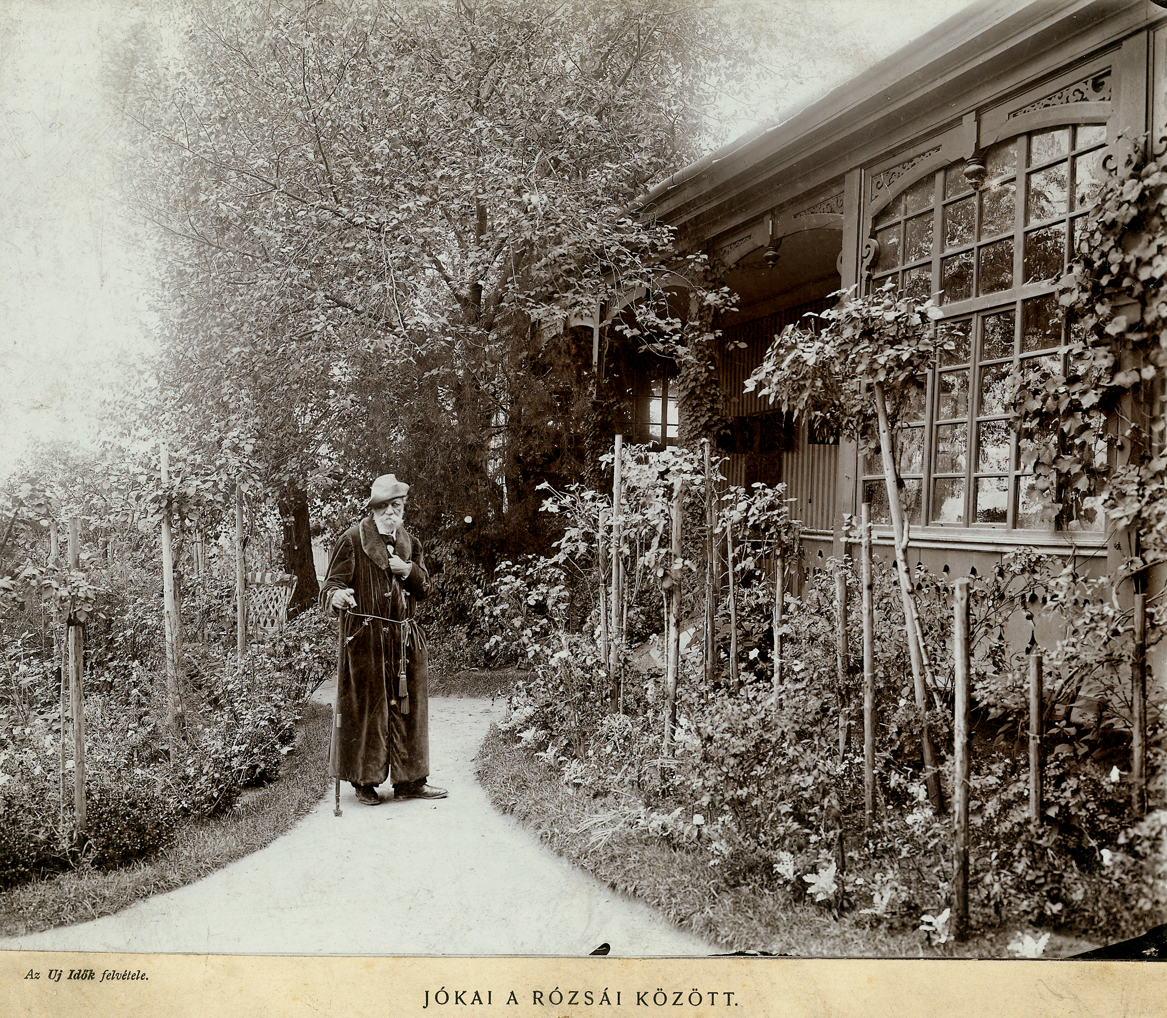 Ásvai Jókai Móric (Komárom, 1825. február 18. – Budapest, Erzsébetváros, 1904. május 5.[1]) regényíró, a „nagy magyar mesemondó”, országgyűlési képviselő, főrendiházi tag, a Magyar Tudományos Akadémia igazgató-tanácsának tagja, a Szent István-rend lovagja, a Kisfaludy Társaság tagja, a Petőfi Társaság elnöke, a Dugonics Társaság tiszteletbeli tagja.